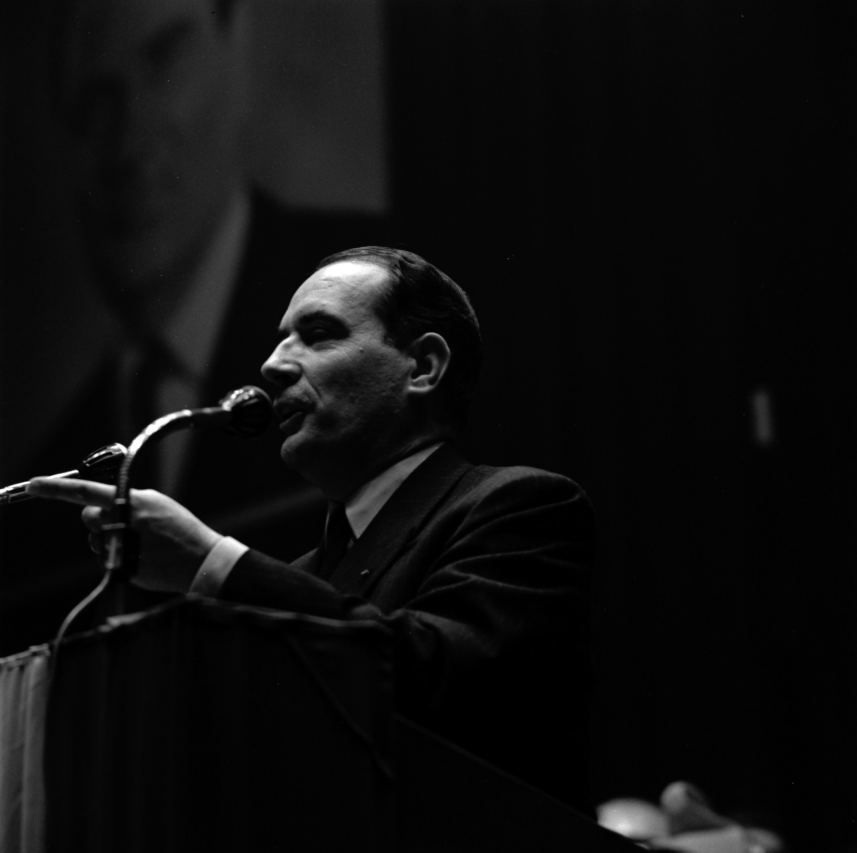 Pas de lieu. Le 17 Décembre 1965. Vue de François Mitterand en gros plan, en plein discours, lors d'un meeting de la campagne présidentielle.